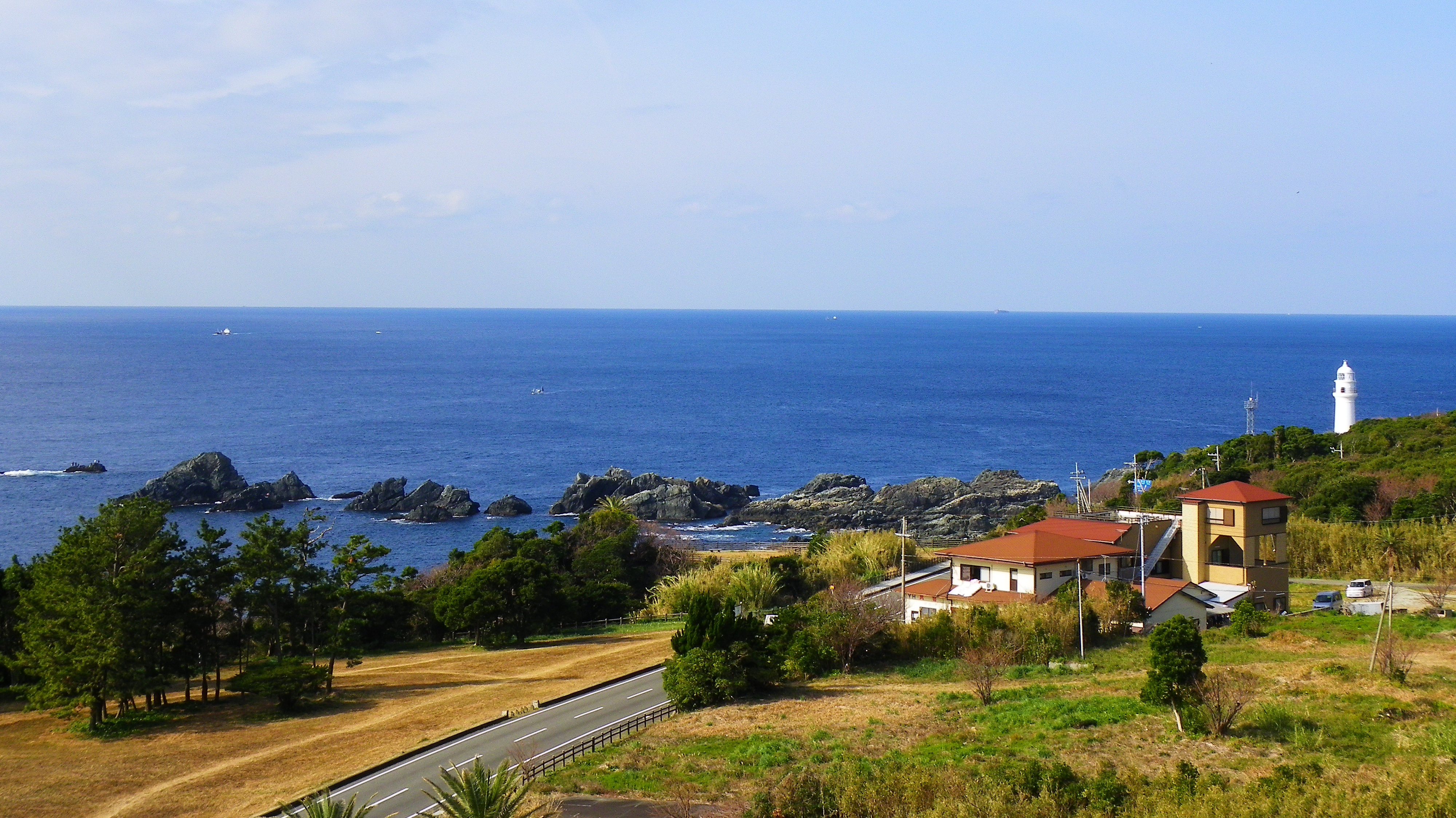 潮岬観光タワー展望台から望む潮岬海岸と潮岬灯台。